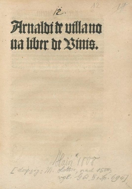 Liber de vinis, attributed to Arnaldus de Villa Nova, Leipzig c. 1500, title page